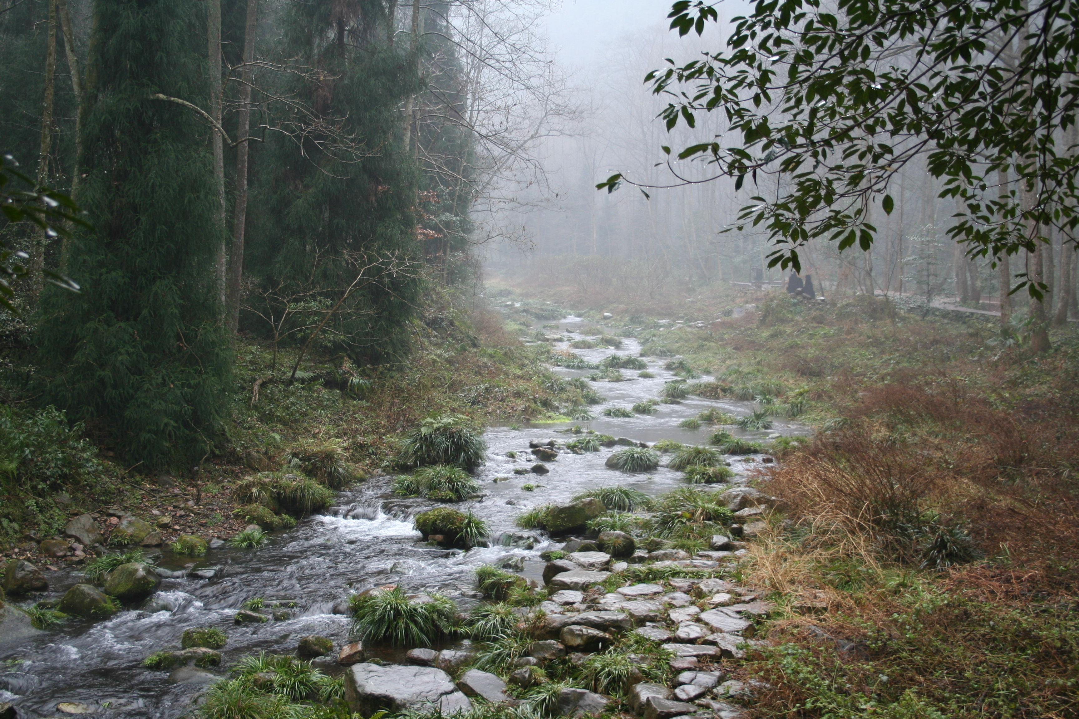 Wulingyuan national park